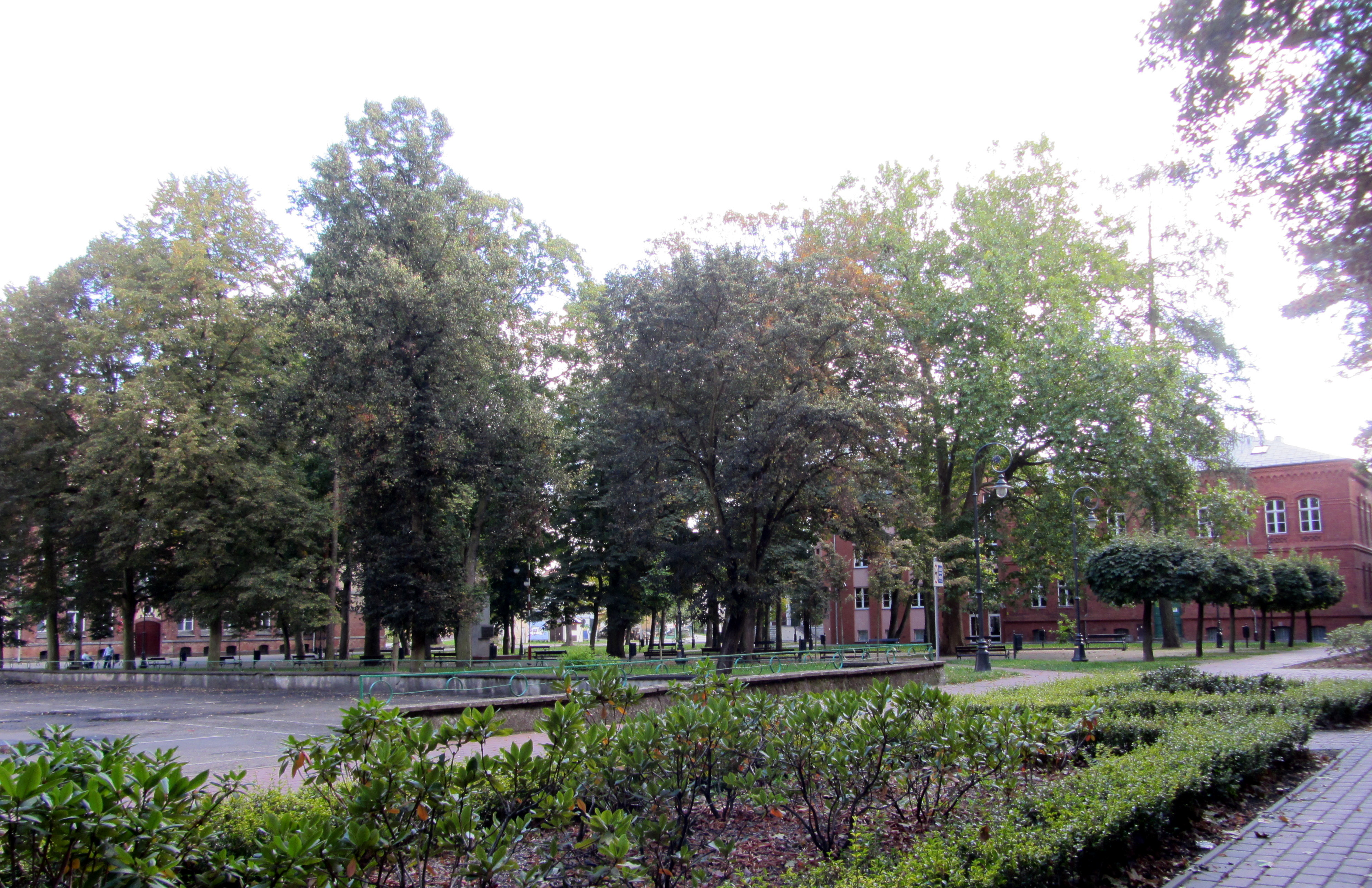 Świebodzin, zespół architektoniczny, XIX/XX